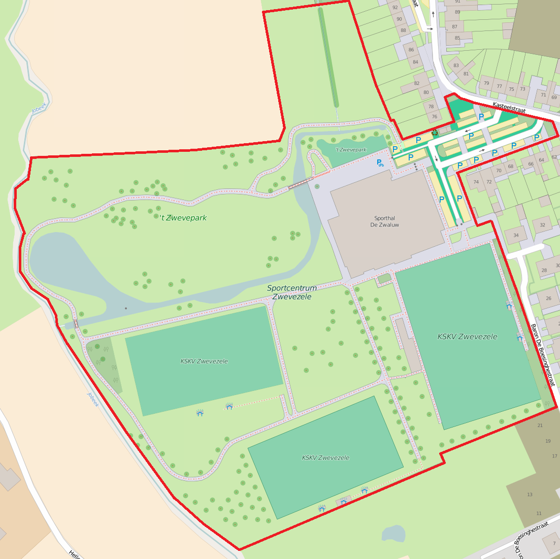 Grondplan van het sportcentrum in Zwevezele en 't Zwevepark. In het oosten grenst het aan de Jobeek (Ruddervoorde - Egem).